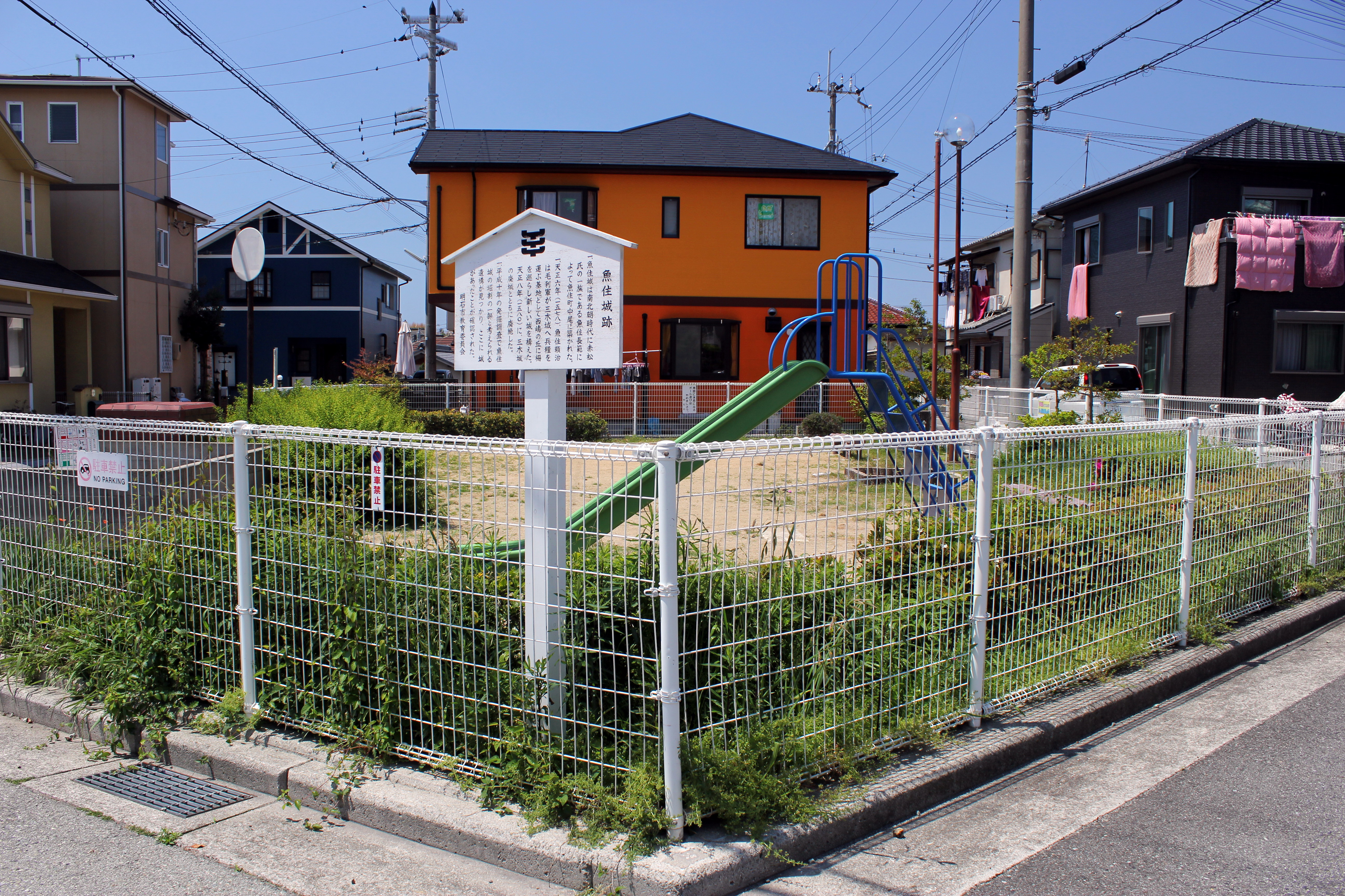 明石 魚住城跡